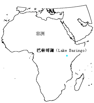 巴林哥湖地理位置示意圖，prattflora繪。